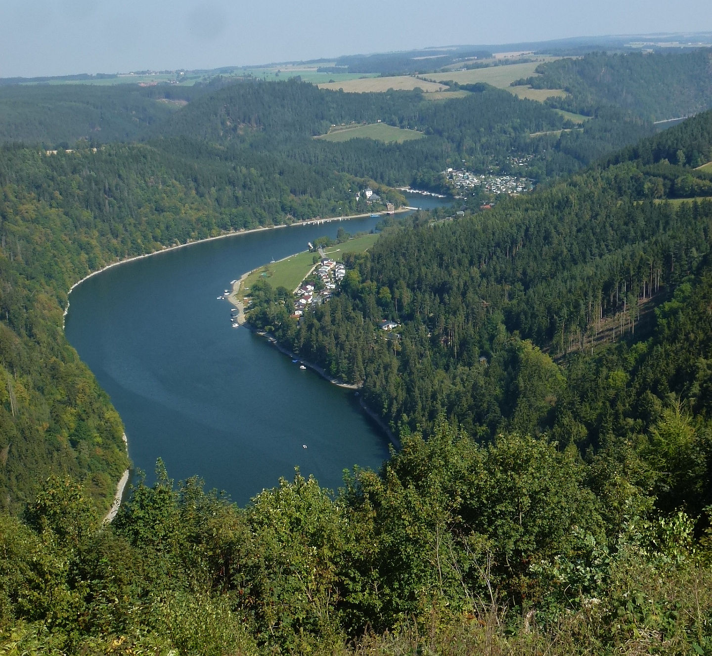 Blick auf die Hohenwarte-Talsperre von der Hohen Leite